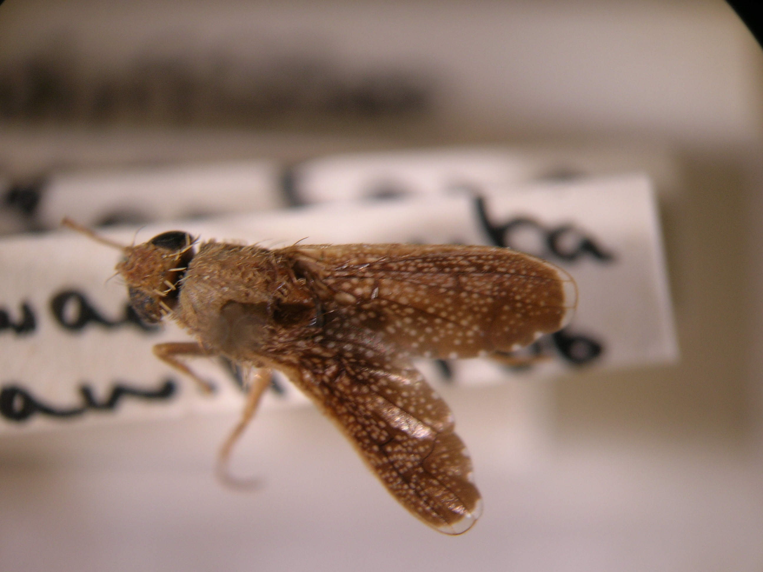 Lantana camara (Lantana) Pinned Eutreta xanthocaeta from Kawaihae Uka Hawaii at Kahului HDOA Insectary, Maui, Hawaii. April 21, 2010 #100421-9440 Image Use Policy